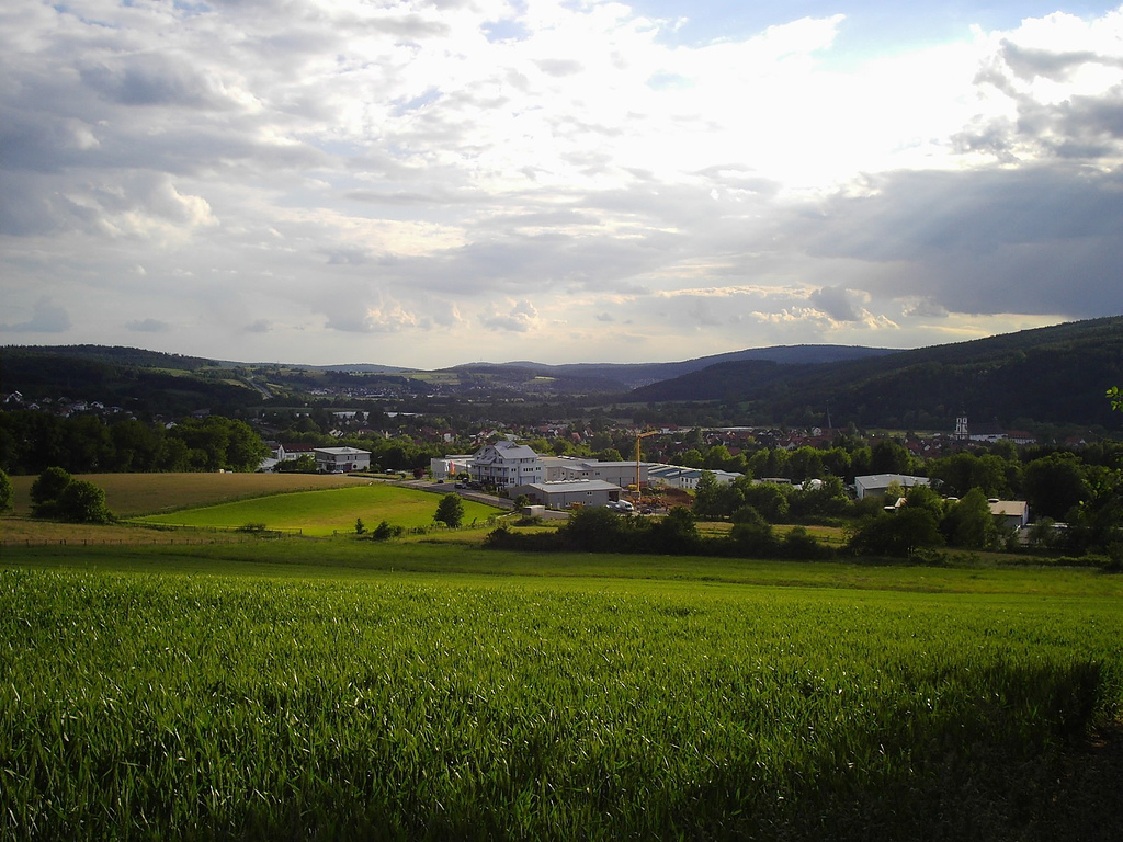 Kinzigtal mit Sicht auf Bad Soden-Salmünster, Aufenau und Wächtersbach